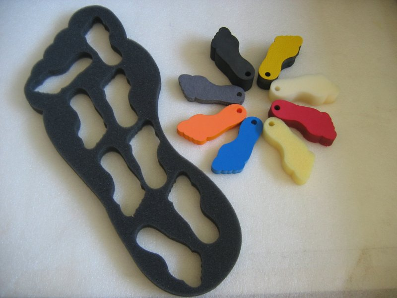 Izdelki iz poliuretanske pene.